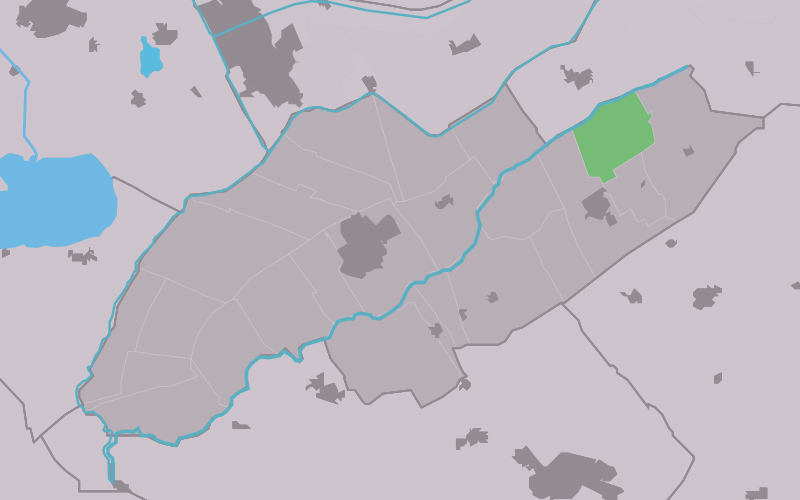 Kaartsje fan himrik fan Sânhuzen